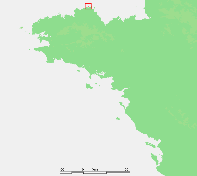 FR Les Sept Iles.PNG